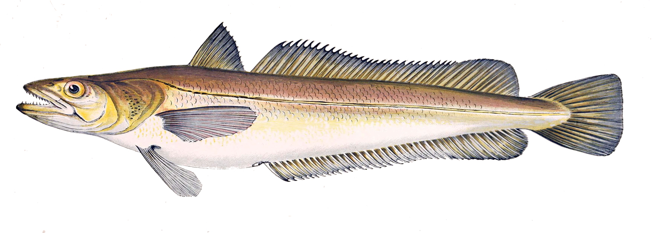 Merluccius merluccius